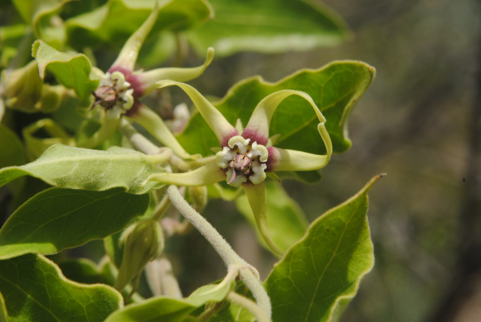 Oxypetalum pannosum. Apocynaceae. Fotos tomadas sobre arbustos al margen del Arroyo del Oeste en Sierras de Rocha, departamento de Rocha, Uruguay.